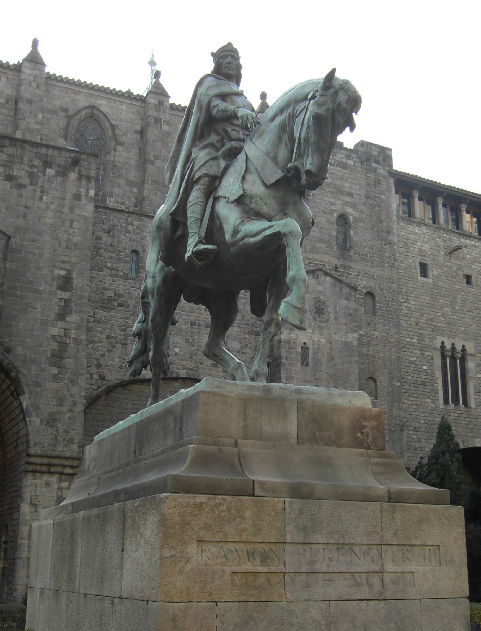 Ramon Berenguer III equestrian statue - Barcelona, Catalonia. Ramon Berenguer III el Gran (Rodés, Occitània 1082 - Barcelona 1131 ), Comte de Barcelona i Girona (1097-1131); Comte d'Osona (1097-1107 i 1111-1131); Comte de Provença (1113-1131) i Comte de Cerdanya (1118-1131). (Sculptor: Josep Llimona i Bruguera, 1888)